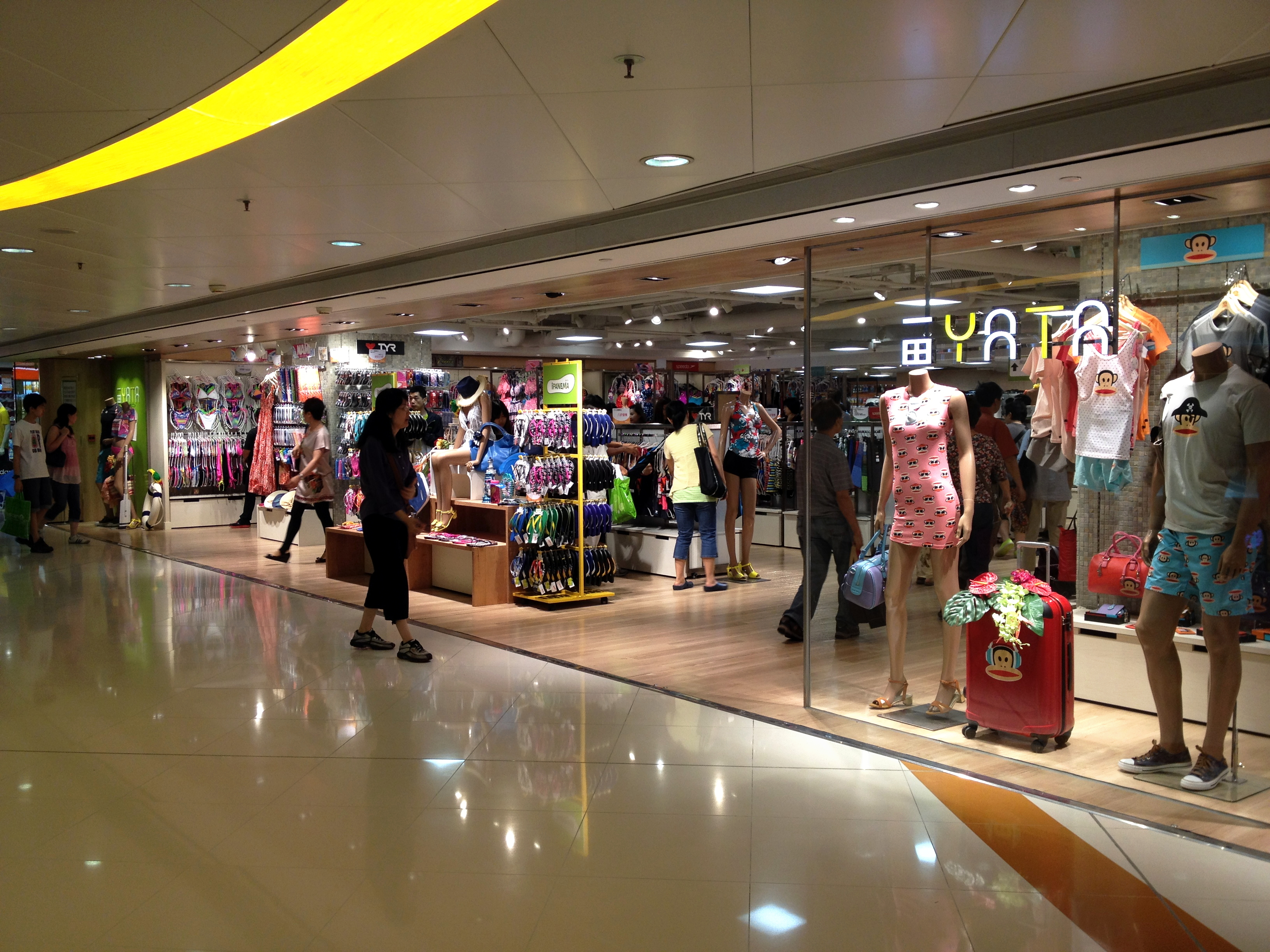 Yata Tsuen Wan Store L3 Entrance